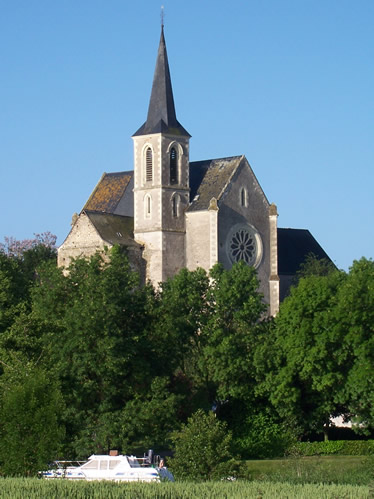 montreuil-sur-Maine, l'Eglise